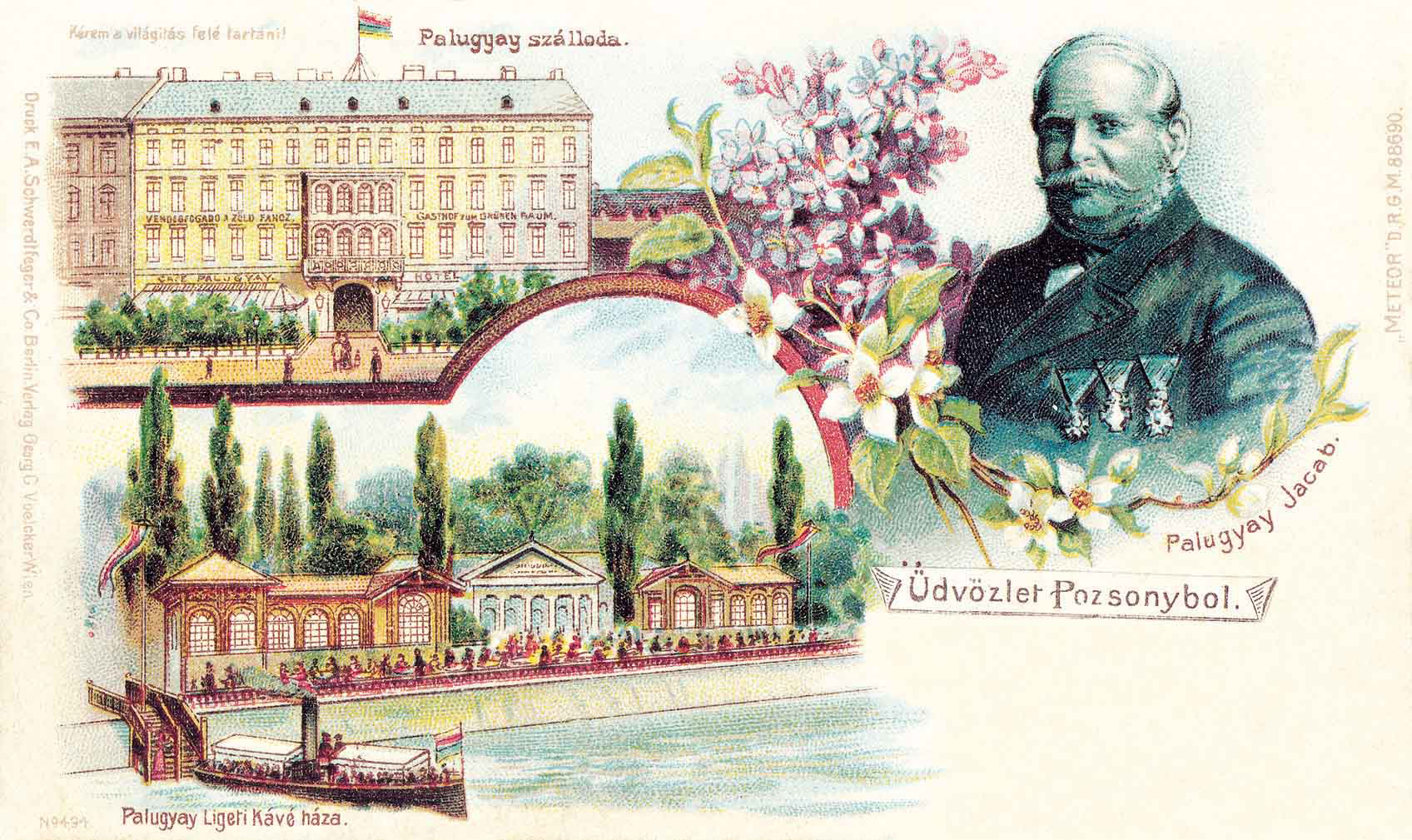 Carte postale "Bienvenu à Pozsony", en l'honneur de Jakab Palugyay, fin XIXe siècle.